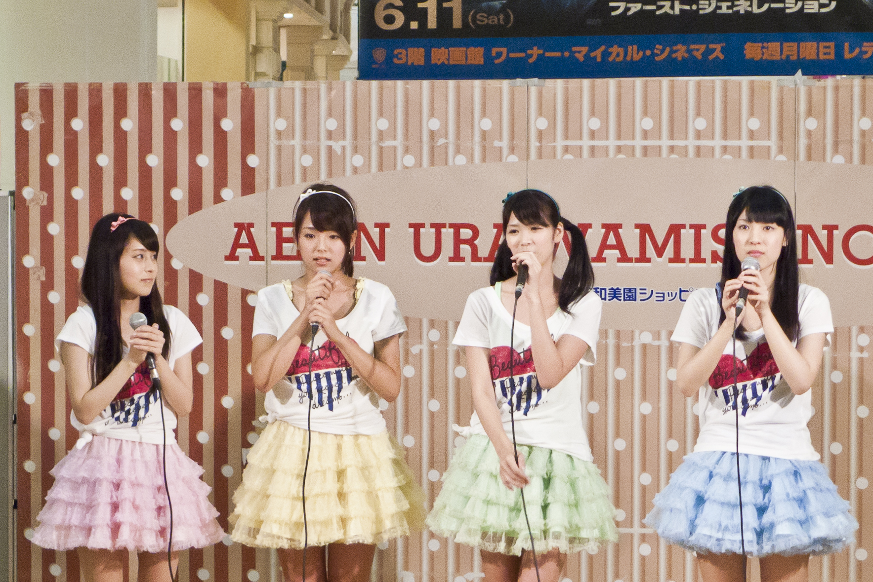 AeLL @AEON Urawa Misono SC